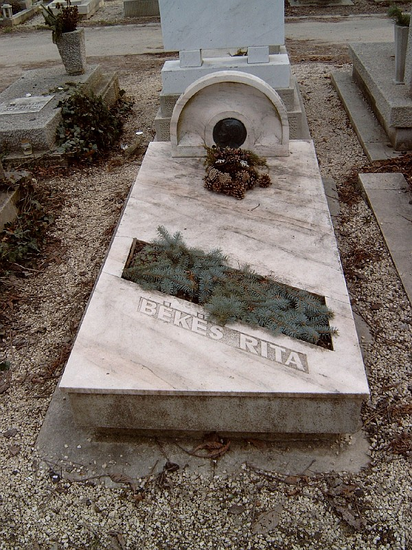 Békés Rita (Debrecen, 1925. július 26. – Budapest, 1978. december 16.) színésznő sírja Budapesten. Farkasréti temető: 25-1-62